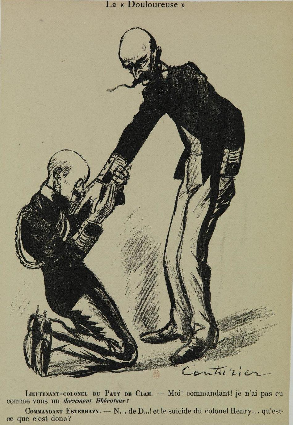 Dessin d'Édouard Couturier titré "La douloureuse", mettant en scène le lieutenant-colonel Armand du Paty de Clam et le commandant Ferdinand Walsin Esterhazy, 1898. Légende : Lieutenant-colonel du Paty de Clam - Moi ! Commandant ! Je n'ai pas eu comme vous un document libérateur ! Commandant Esterhazy - Nom… de D… ! Et le suicide du colonel Henry… Qu'est-ce que c'est donc ?